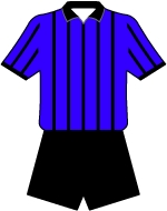 DescriÃ§Ã£o IlustraÃ§Ã£o do uniforme do Palmeiras AtlÃ©tico Clube, Rio de Janeiro LicenÃ§a